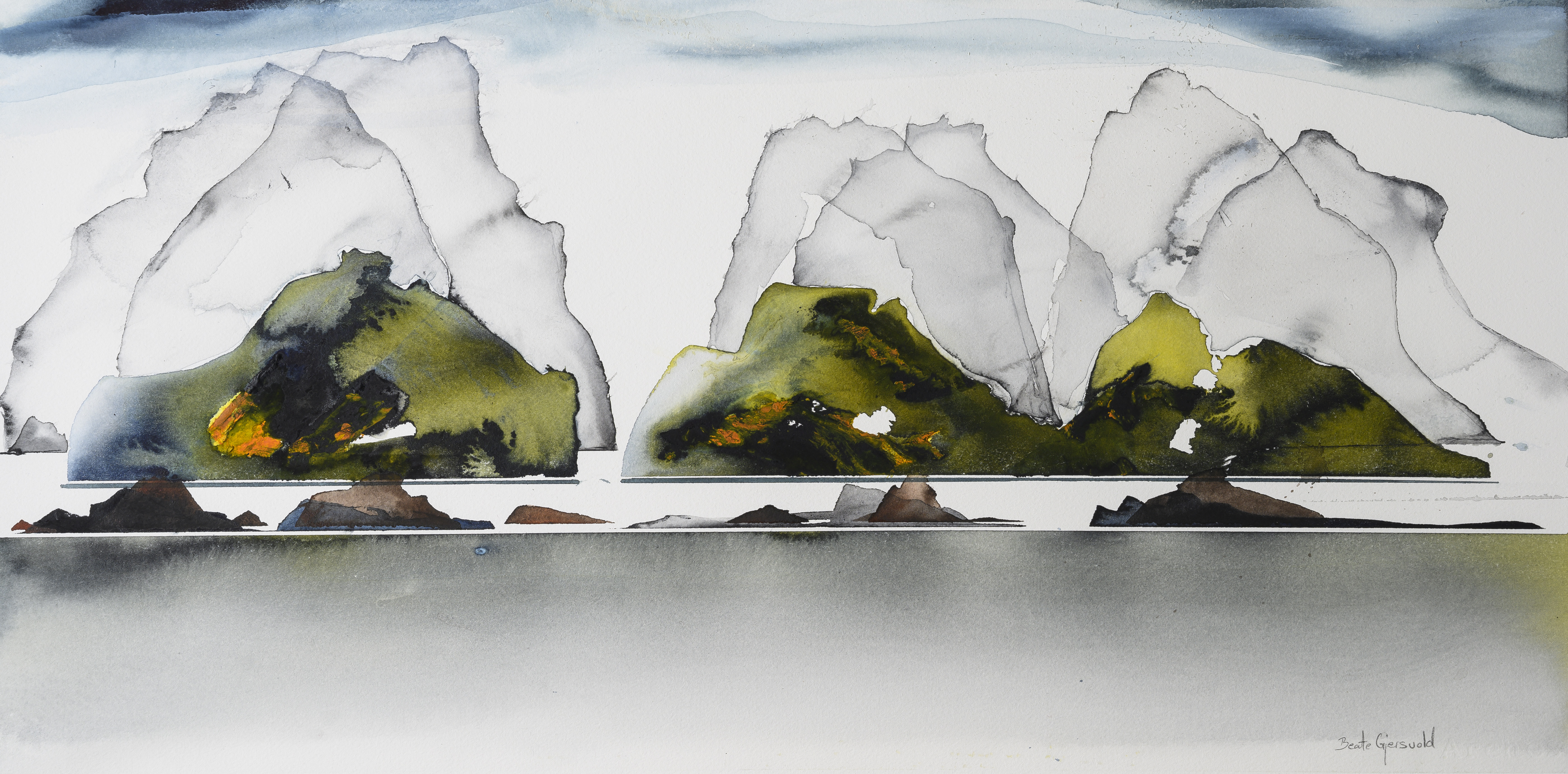 «En grønn». Akvarell av den norske kunstneren Beate Gjersvold (2017). 55,5 x 90 cm Tittelen er en hommage à Hannah Ryggen, som selv brukte tittelen «En blå» på et av sine verk